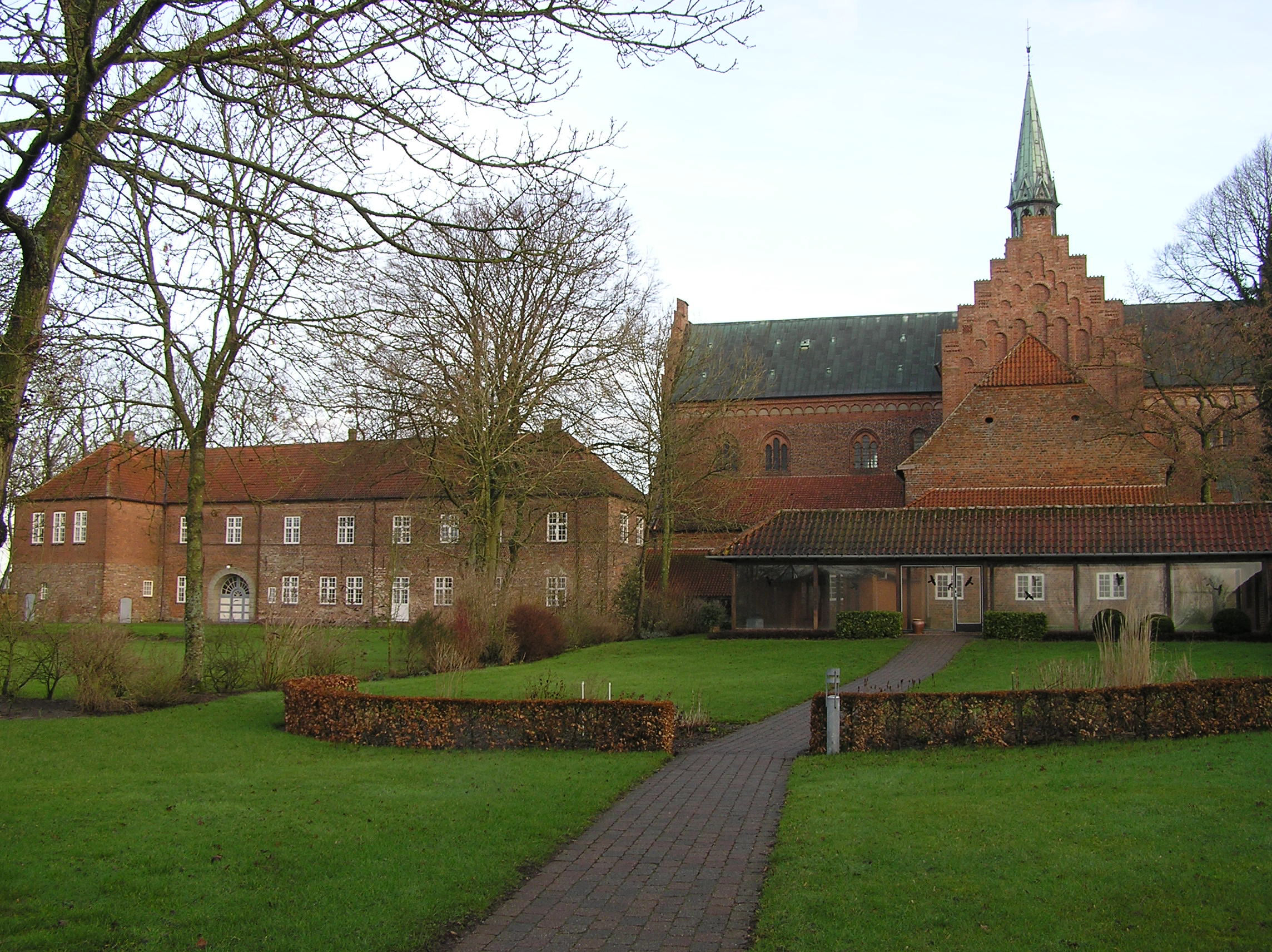 Løgumkloster Kirke og Slottet